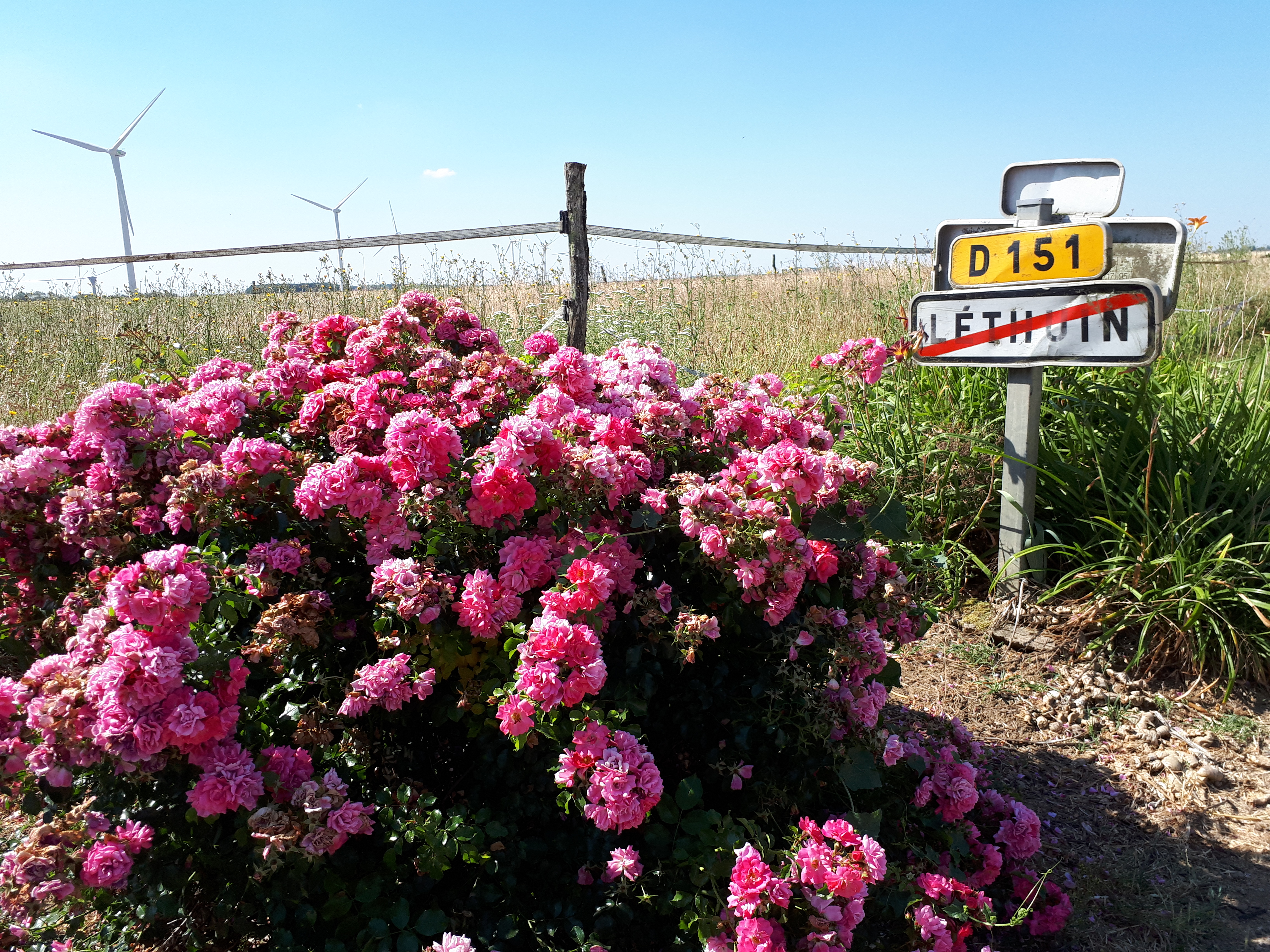 Panneau à Léthuin.